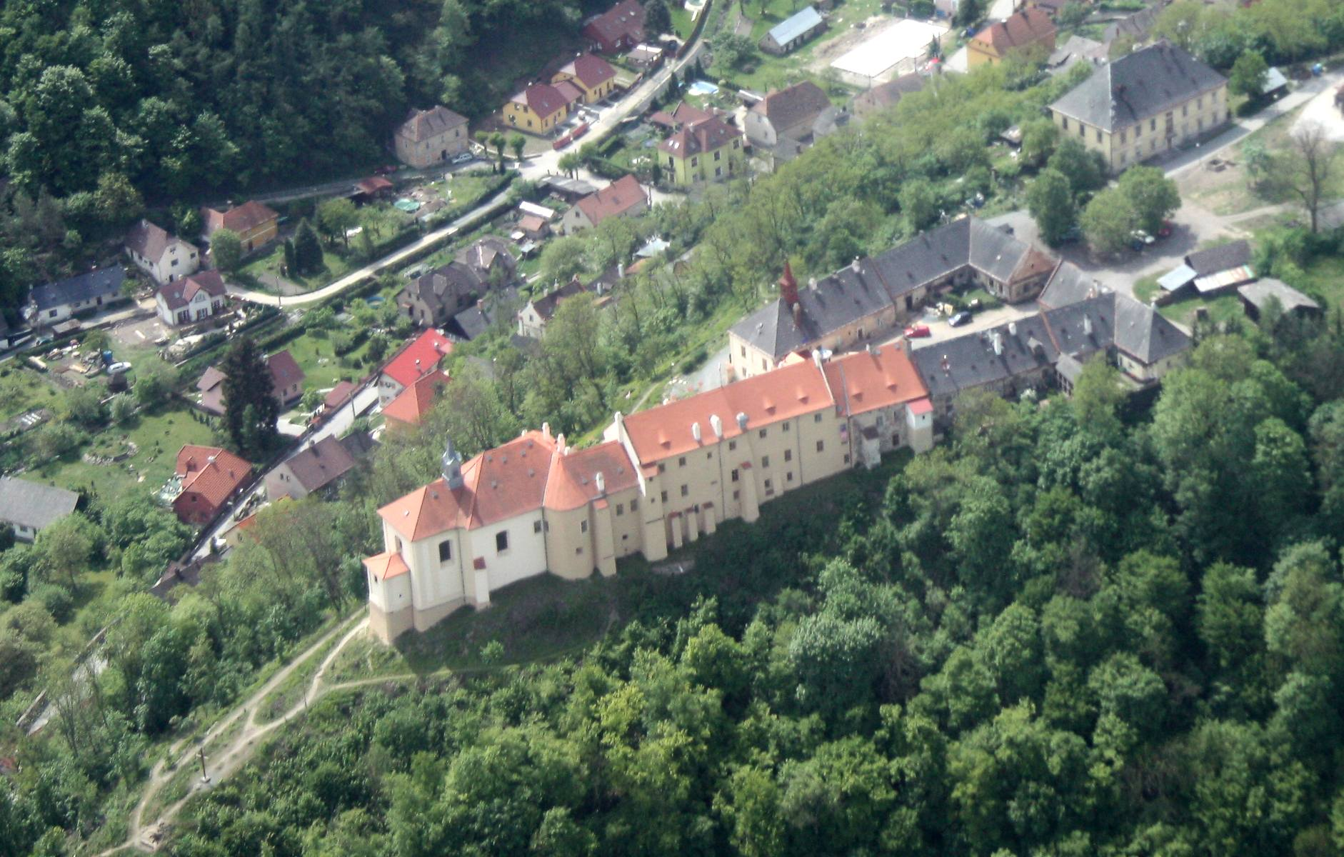 Letecký pohled na Nižbor